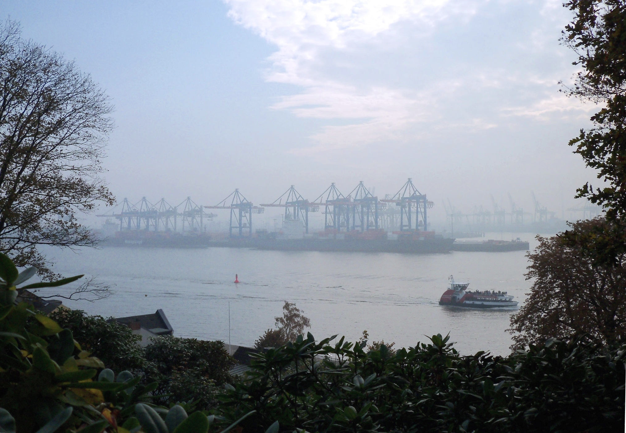 Hamburger Hafen im Morgendunst von der „Himmelsleiter“ (Ottensen) aus.